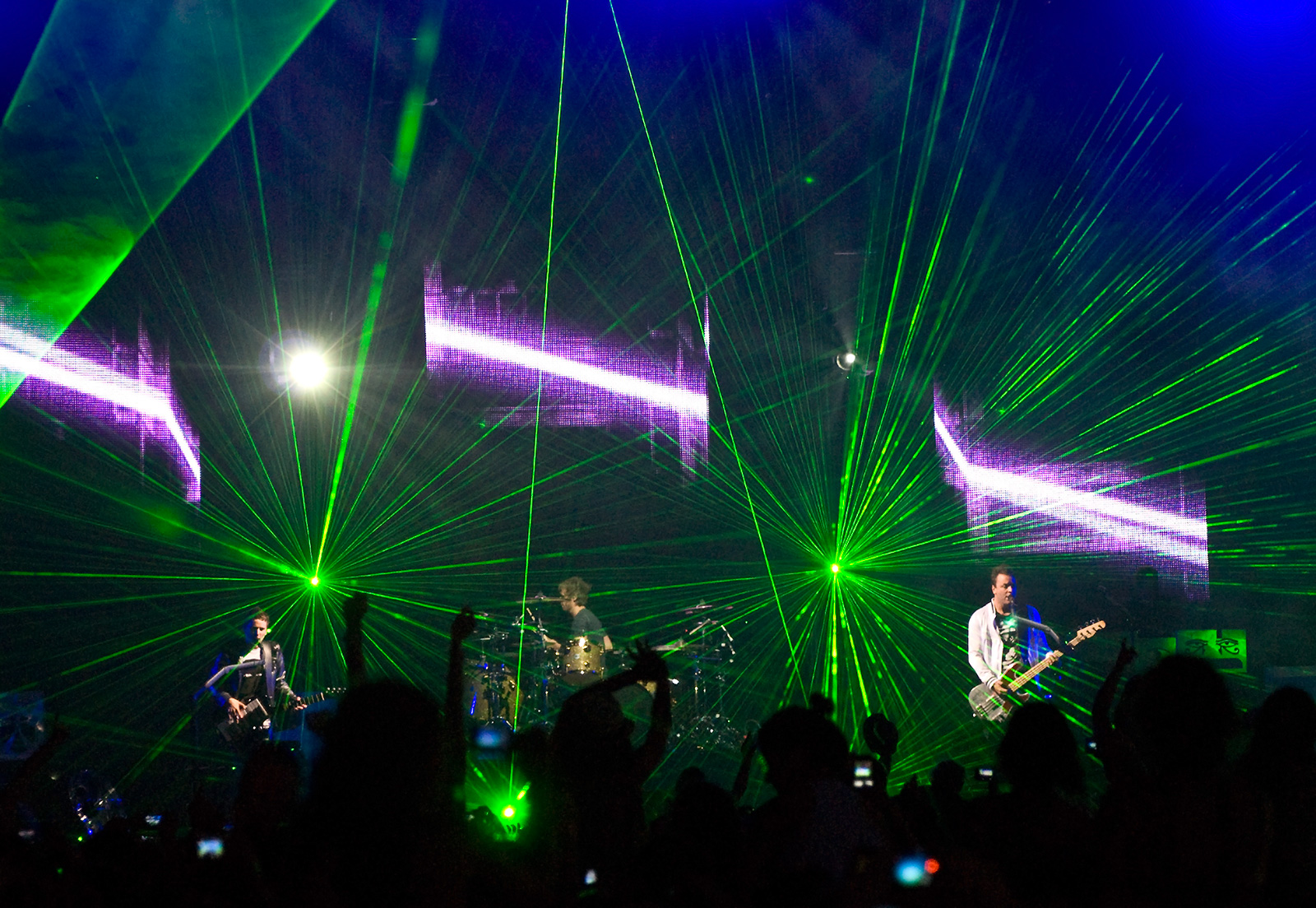 Muse